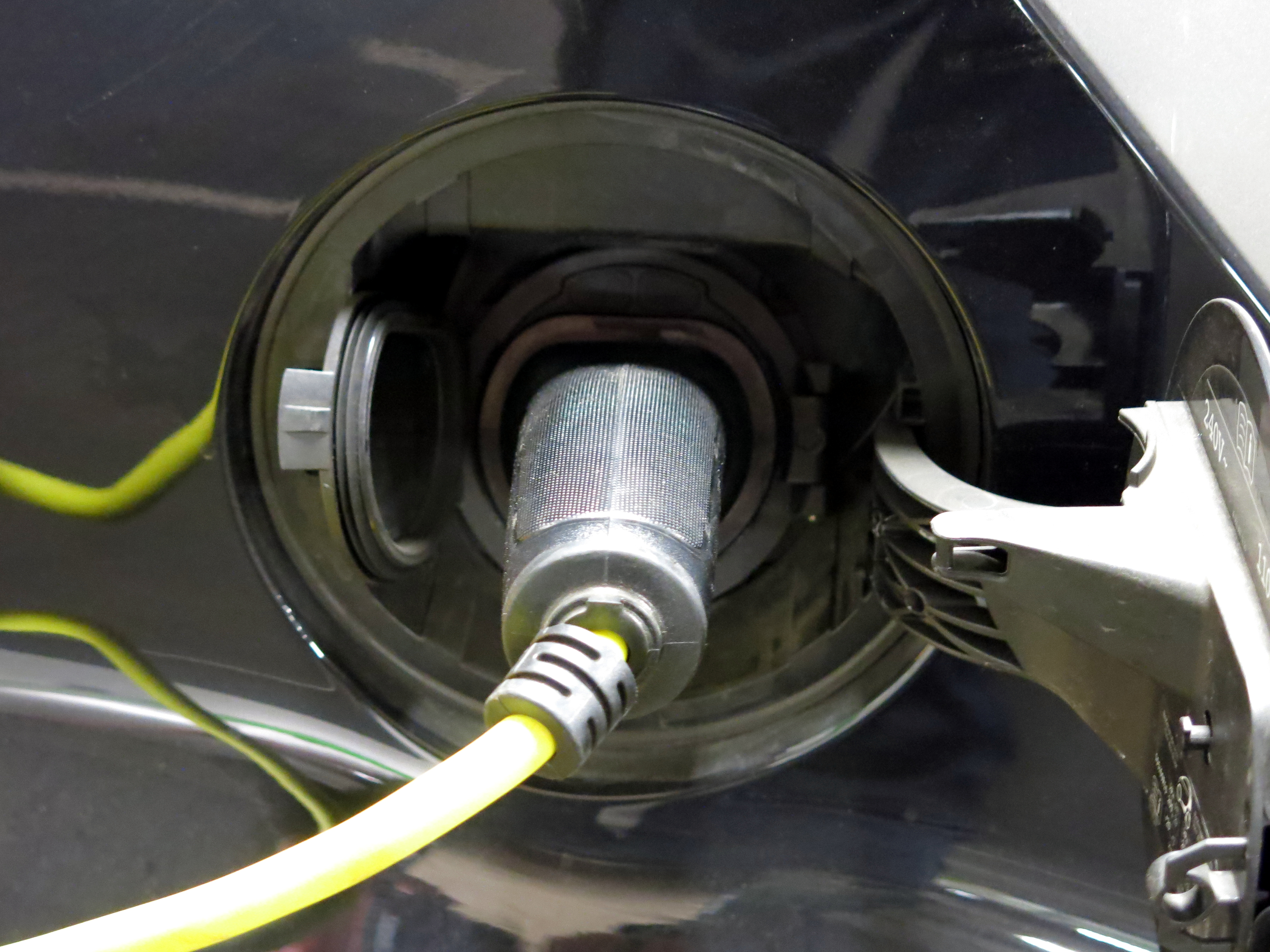 Opluedstatioun e-mobil am Parking Résistance ënner der Brillplaz (Place de la Résistance) zu Esch.